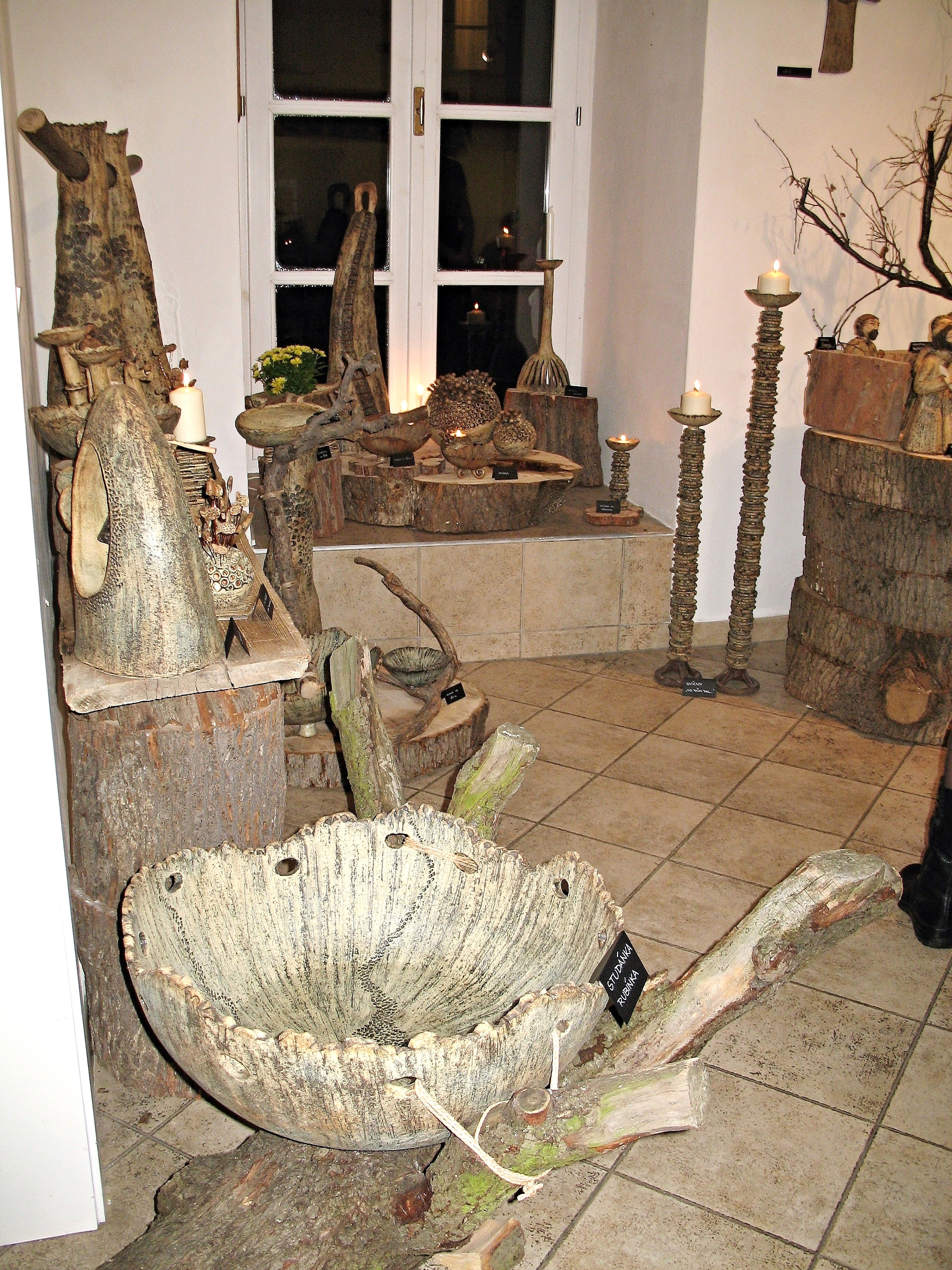 Předvánoční výstavka v přízemí sedlčanského muzea (prosinec 2014)